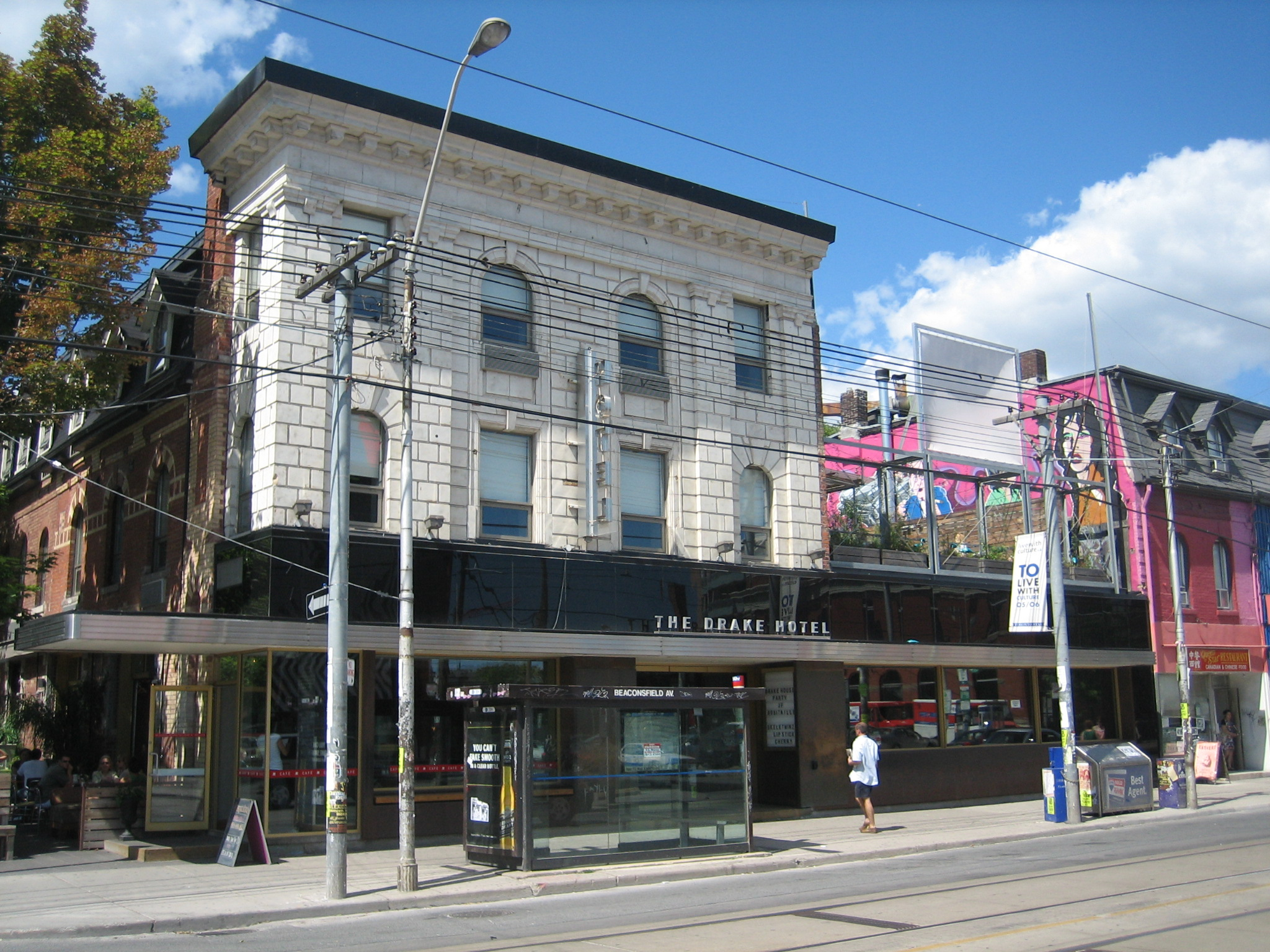 Drake Hotel (Toronto)